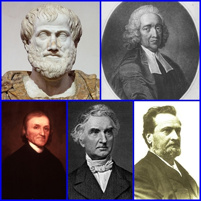 Mosaico de botánicos.